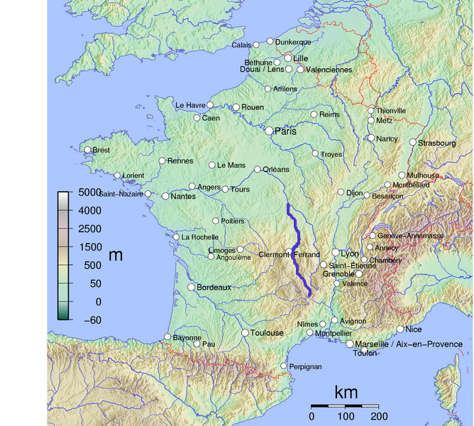 Kaart van de Allier gebaseerd op kaart van Frankrijk in Wikimedia Commons